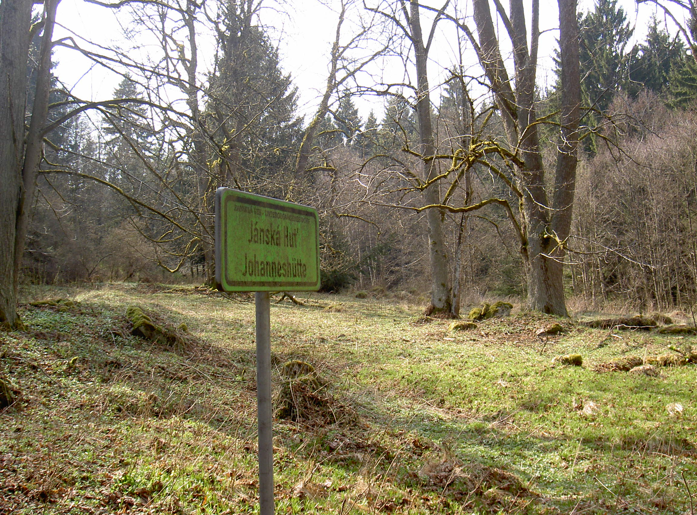 Johanneshütte